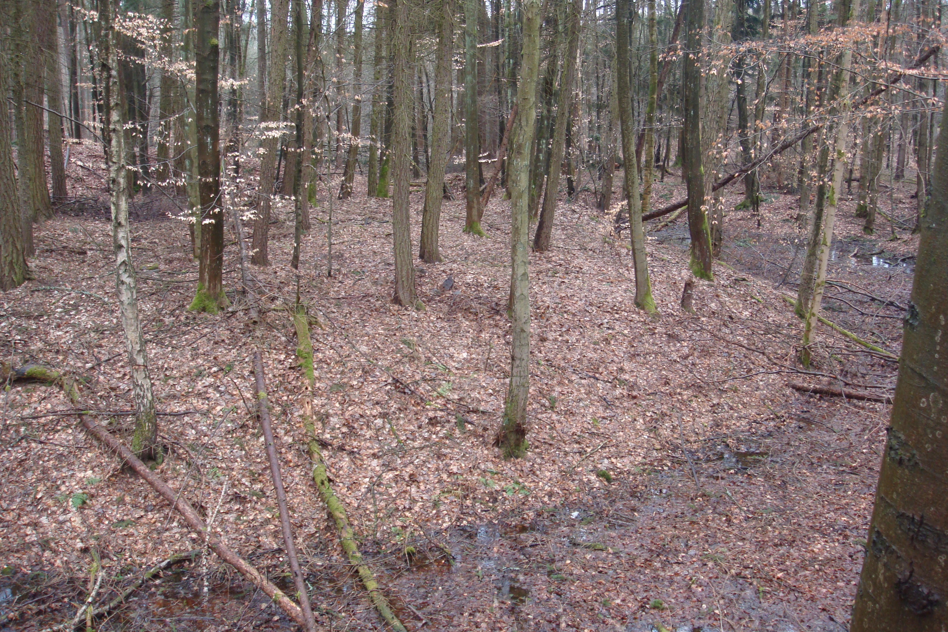 Das Bild zeigt die Burginsel und den umlaufenden Wassergraben. Das Bild ist auf dem Wall stehend aufgenommen. Auf der Insel entdeckt man unter dem Laub, teilweise ziemlich gut, bearbeitete Steine, die zu den Mauern gehört haben. Auf dem Bild ist das nicht allzu gut erkennbar.